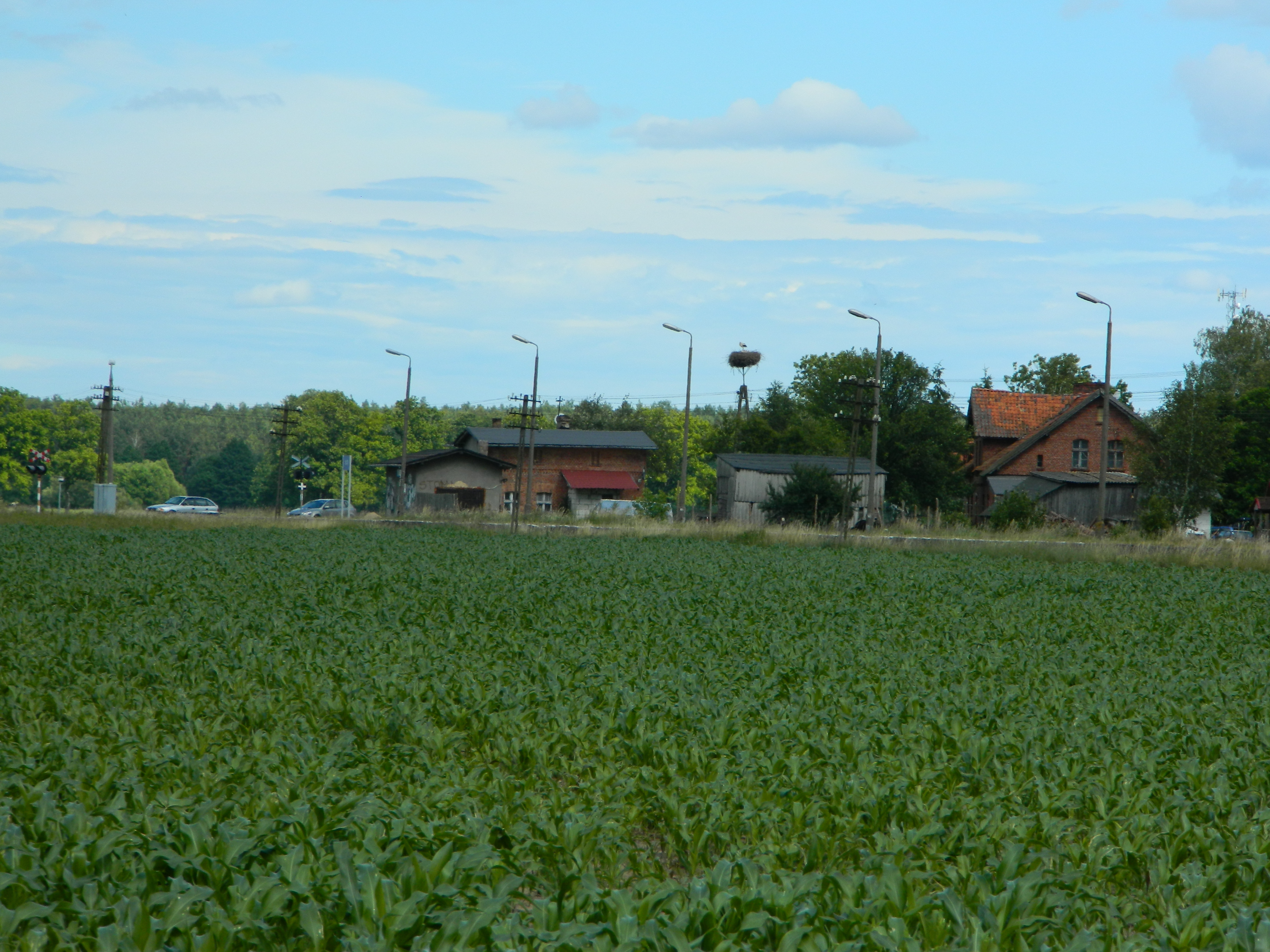 Bocianie gniazdo, stacja Jeruty